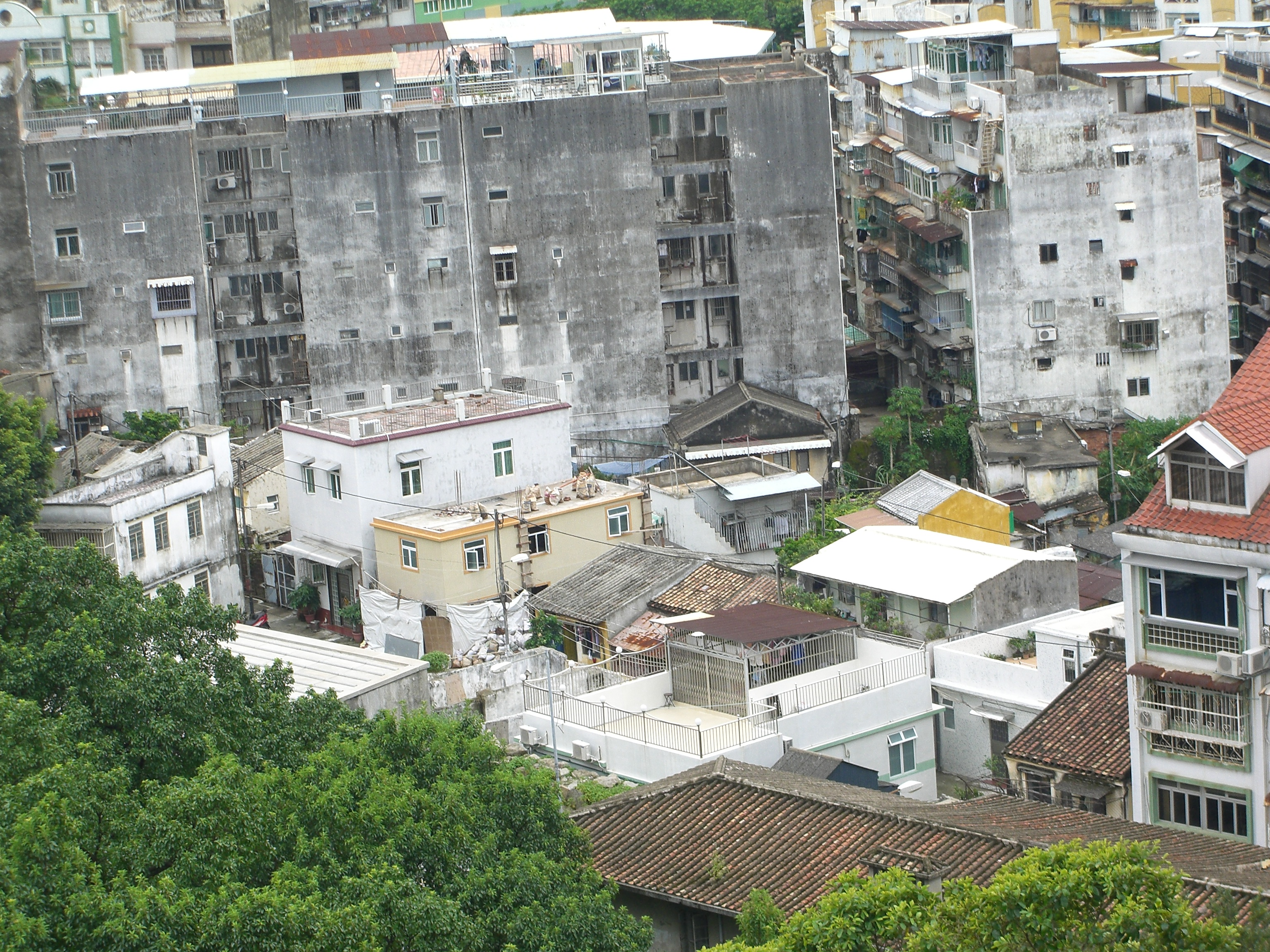 Pátio do Espinho